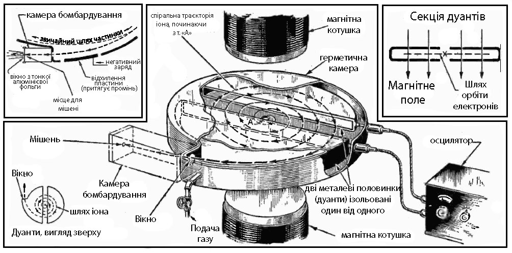 схема циклотрона. Переклад креслення з англомовної статті cyclotron